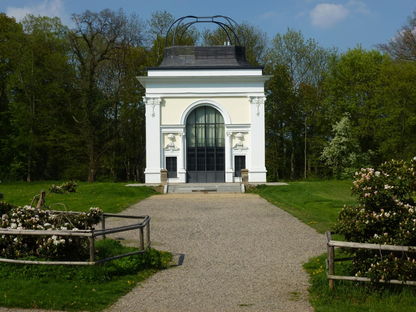 Im Keesschen Park